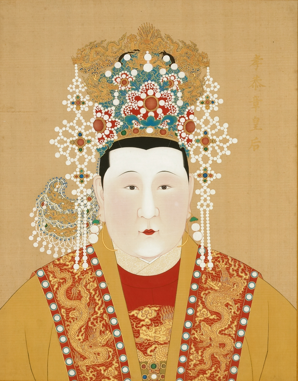 孝恭章皇后孙氏